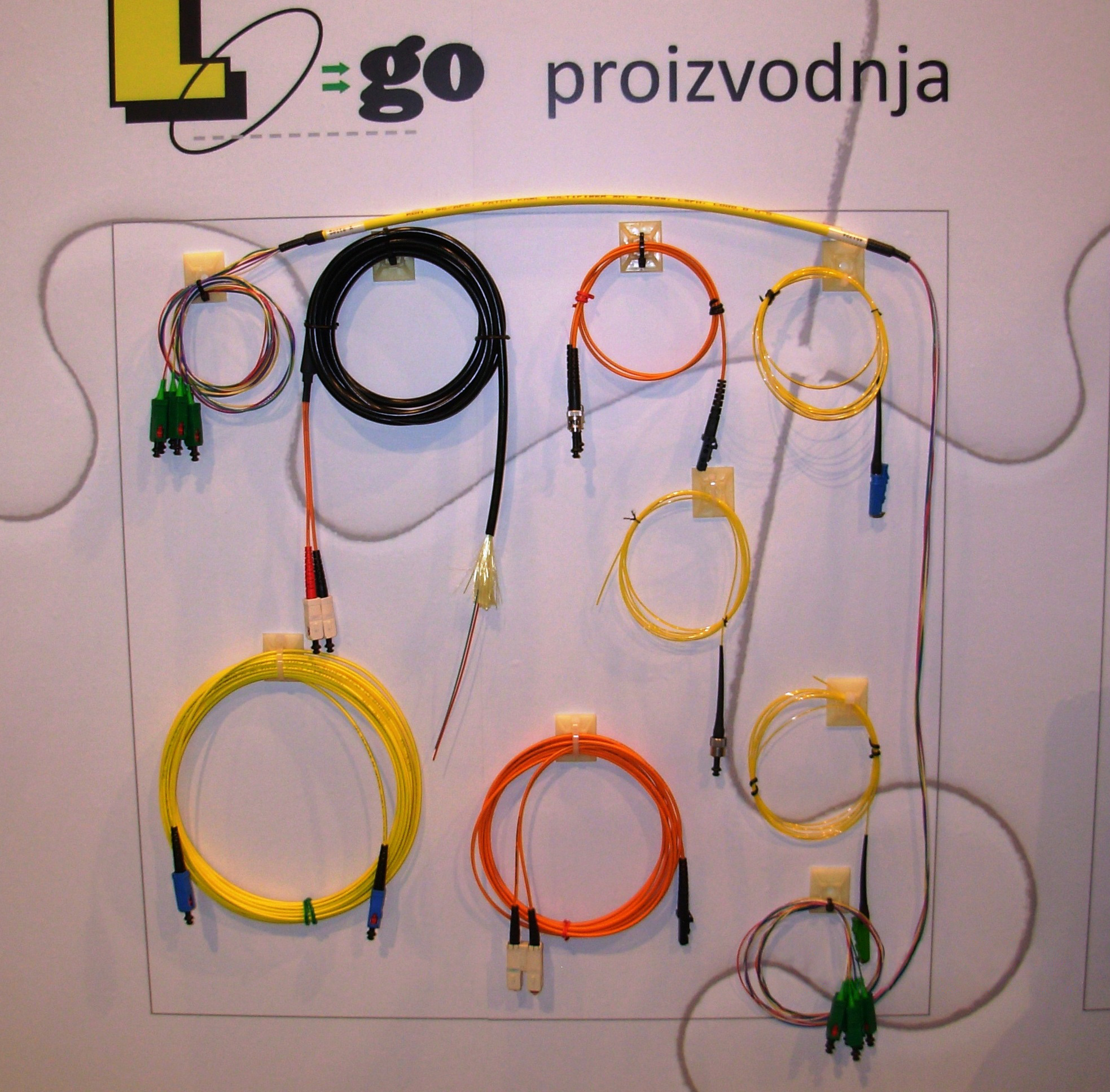 Печкордови са оптичким влакнима на изложби ТЕЛФОР 2011. Сликао Голдфингер.